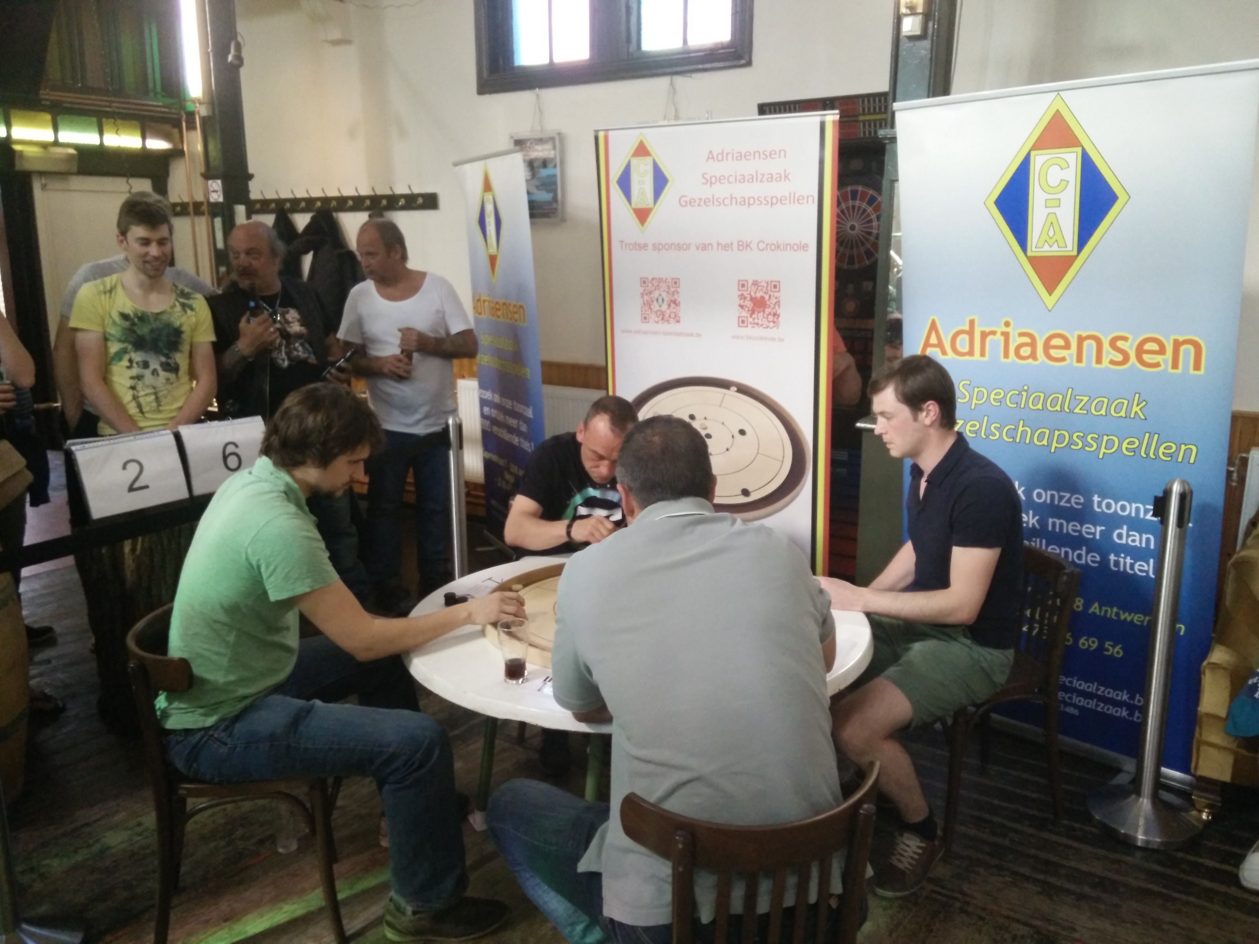 Finale BK Crokinole